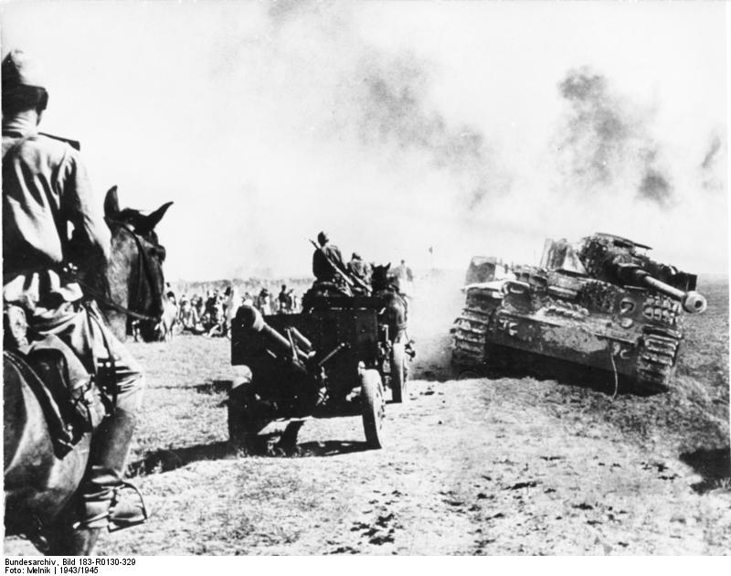 ADN-ZB/Melnik II. Weltkrieg 1939 - 1945 Vorbei an zerstörten Panzern der Hitler-Wehrmacht geht der Vormarsch der Roten Armee weiter